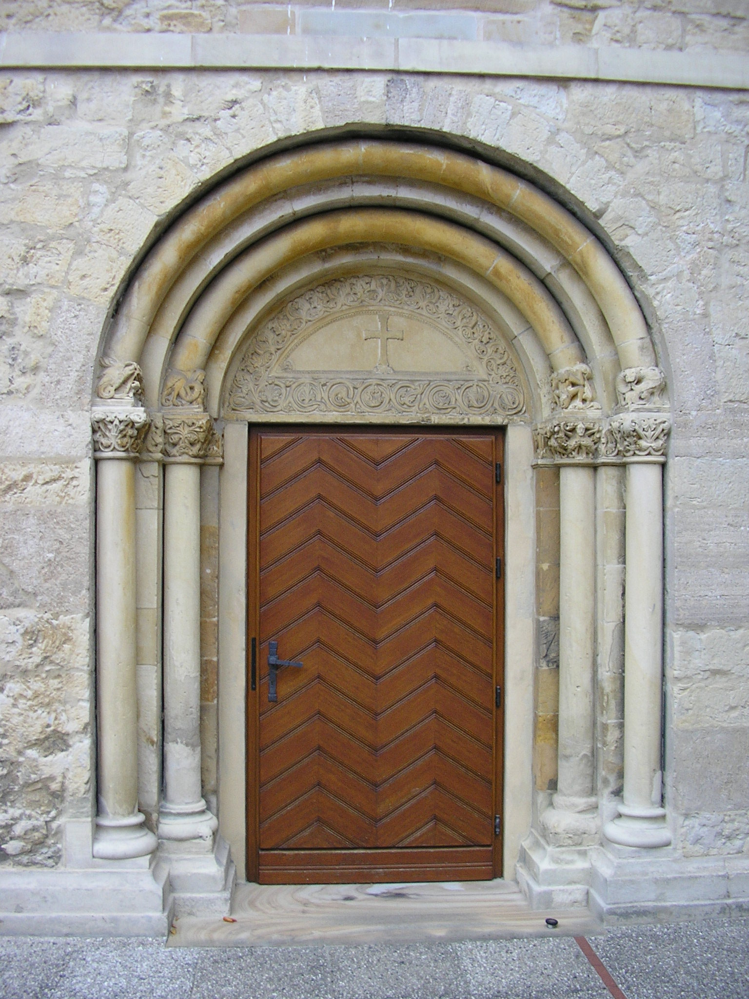 ehemaliges Prämonstratenserkloster Lette, romanisches Portal von St. Vitus